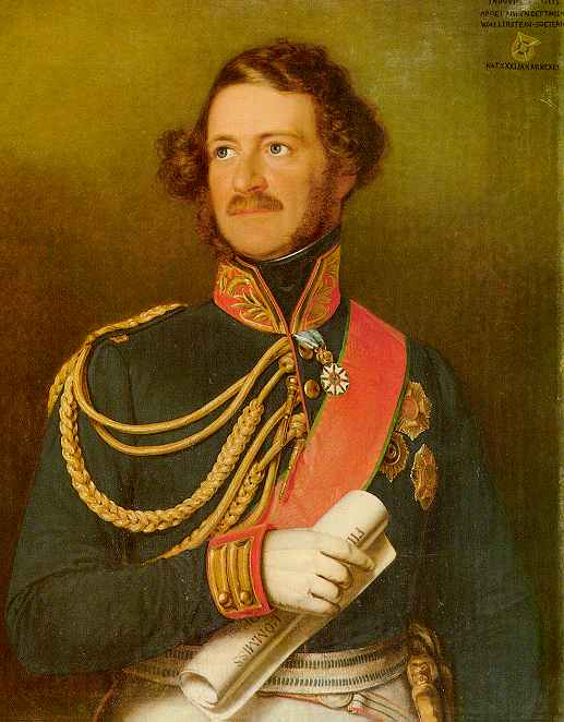 Lodewijk Kraft Ernst van Oettingen-Oettingen en Oettingen-Wallerstein.